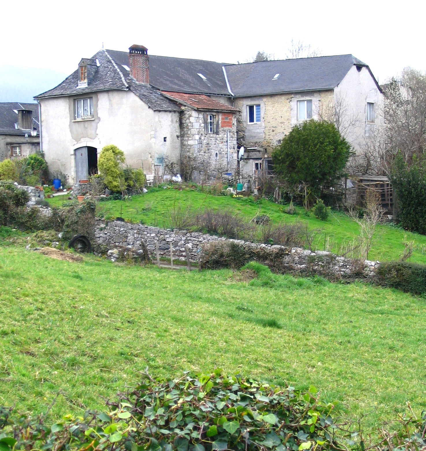 Maison à Sainte-Colome, pyrénées atlantiques, France